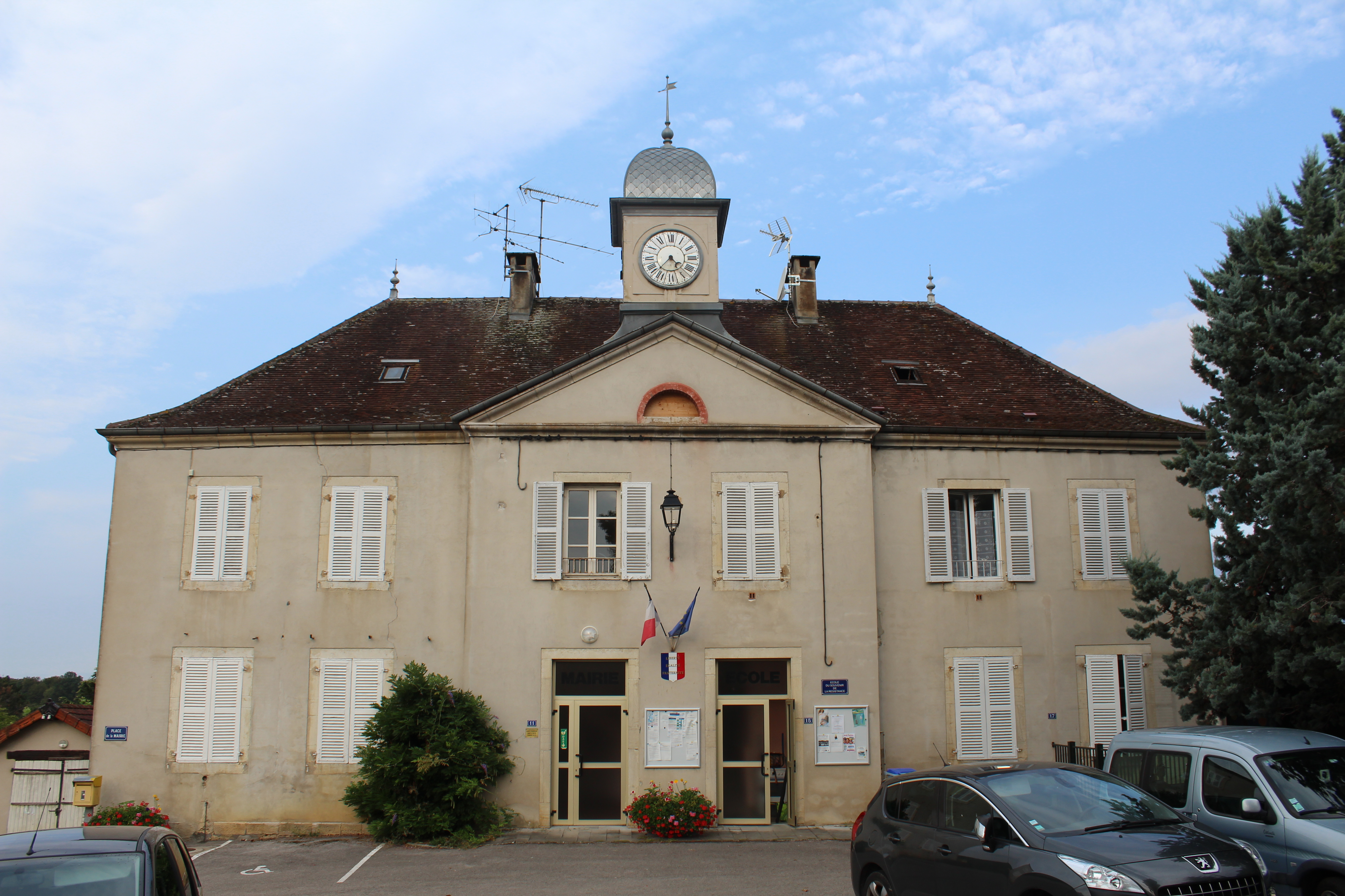 Mairie de Saint-Didier, Jura.